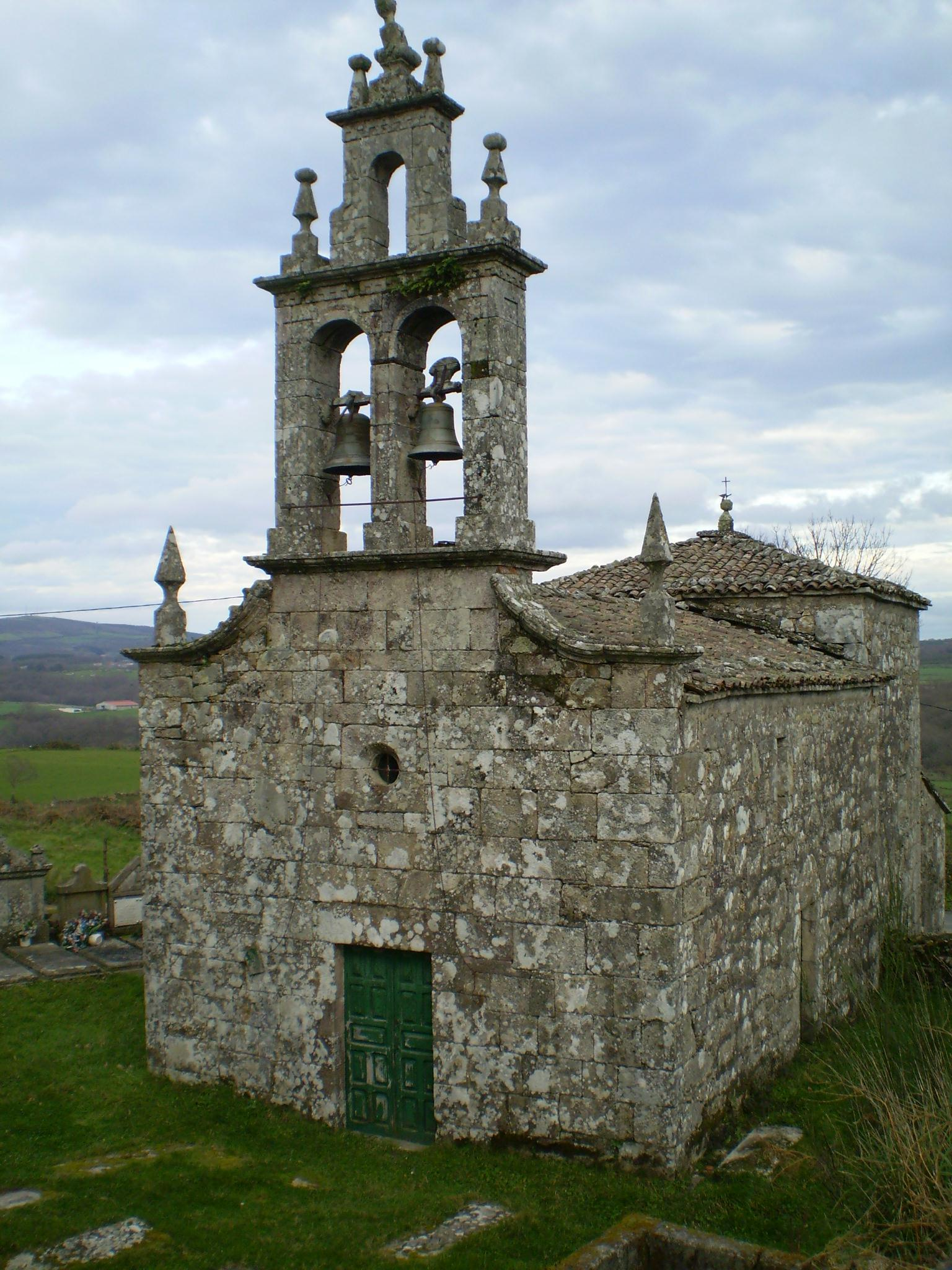 Igrexa de O Rial (Antas de Ulla)